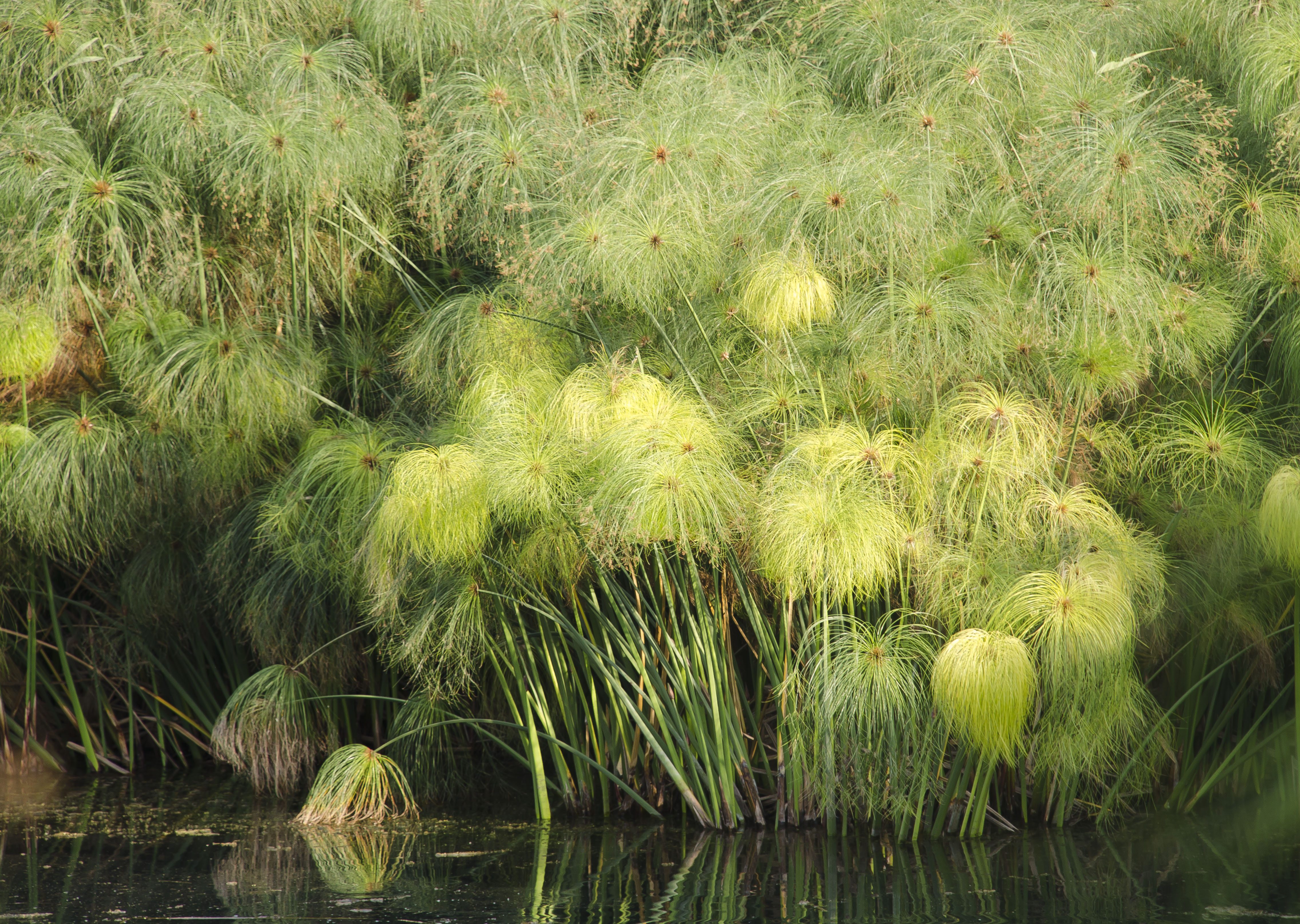 Papyrus Sedge (Cyperus papyrus), Riserva Naturale Orientata Fiume Ciane - Saline di Siracusa, near Siracusa, Sicily